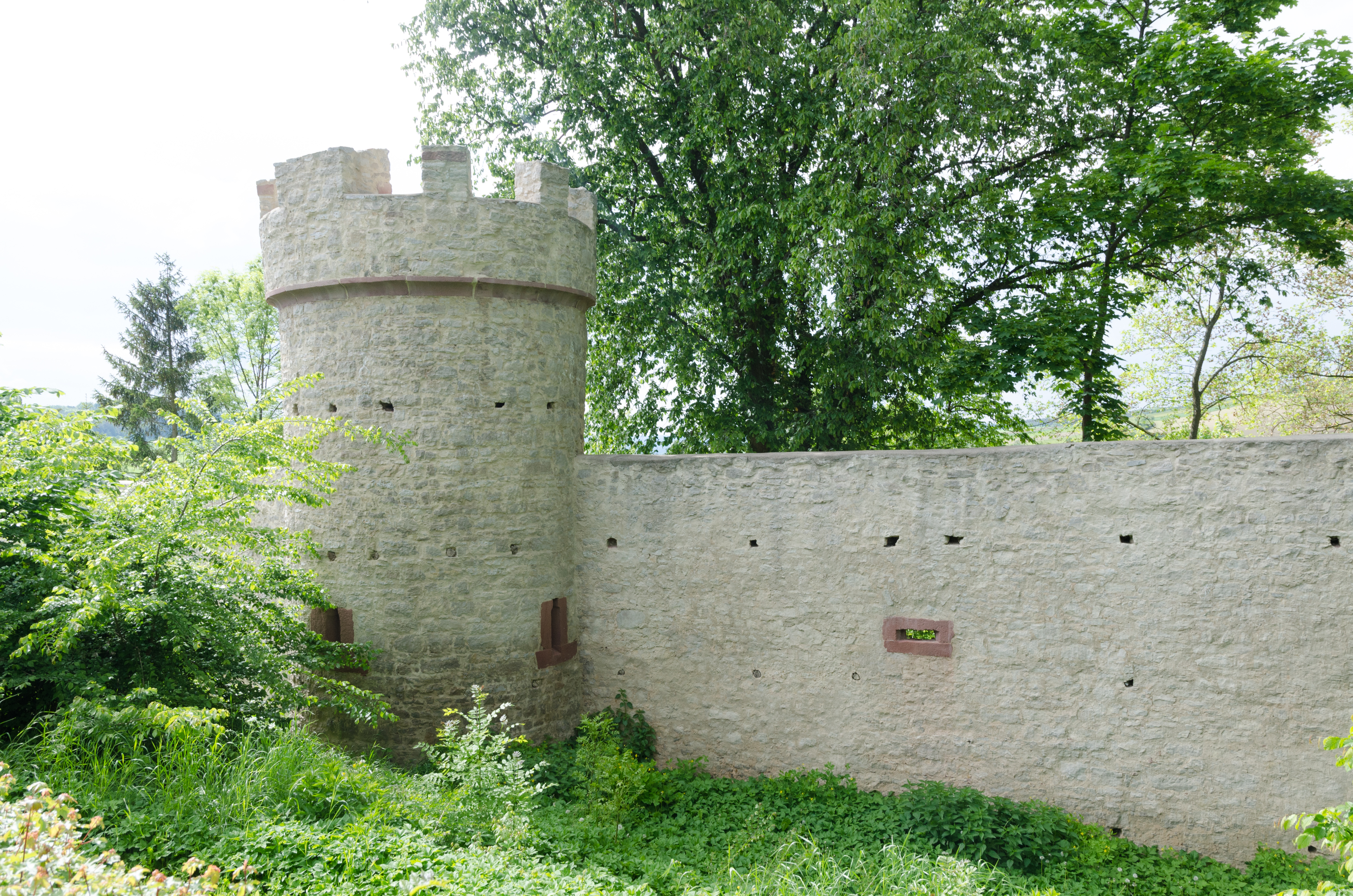 Neubrunn, Ortsbefestigung, nördlich Hegweg